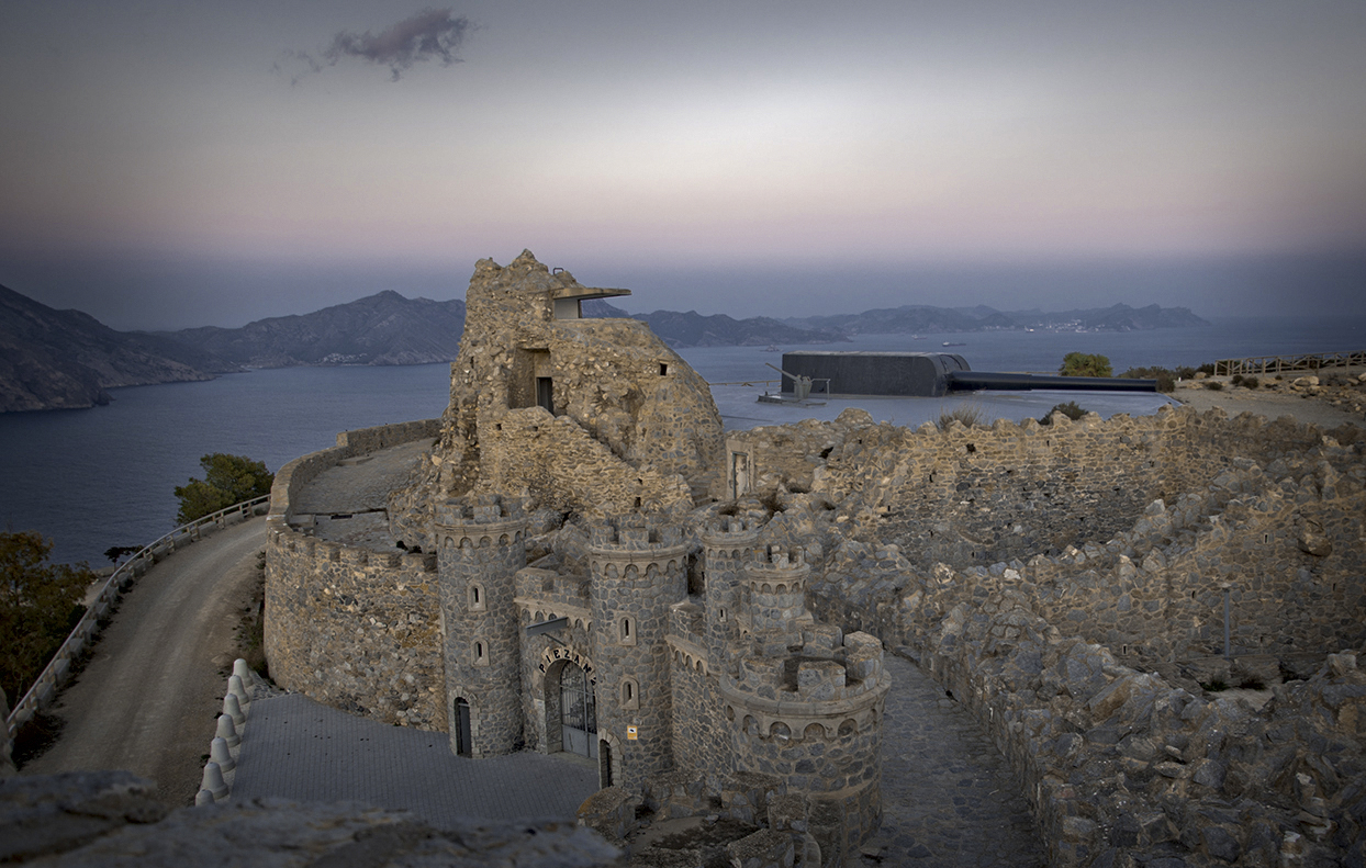 Batería de Castillitos